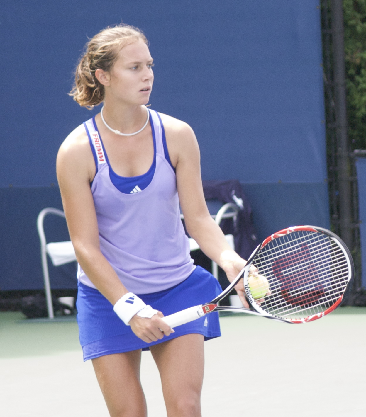 Stefanie Vögele at the 2009 US Open